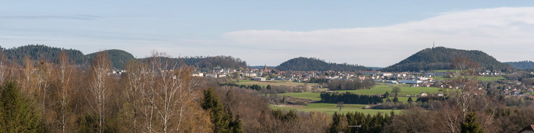 Vue générale sur Bruyères depuis le château d'eau du Syndicat des Eaux de Stéaumont à Fiménil. De gauche à droite : l'Helledraye, le Buemont, Fouchon (en arrière plan), la colline du Château, Pointhaie et le mont Avison.